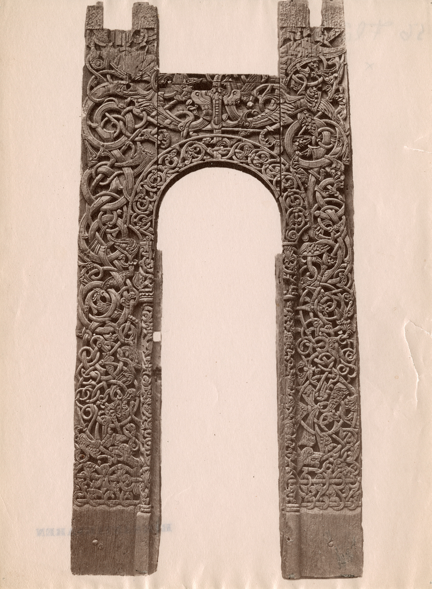 Portal fra Flå stavkirke. Ukjent fotograf. Fra Riksantikvarens Kulturminnebilder.